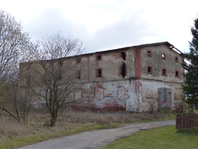 Stare Ludzicko, Reste ehem. Gutshof